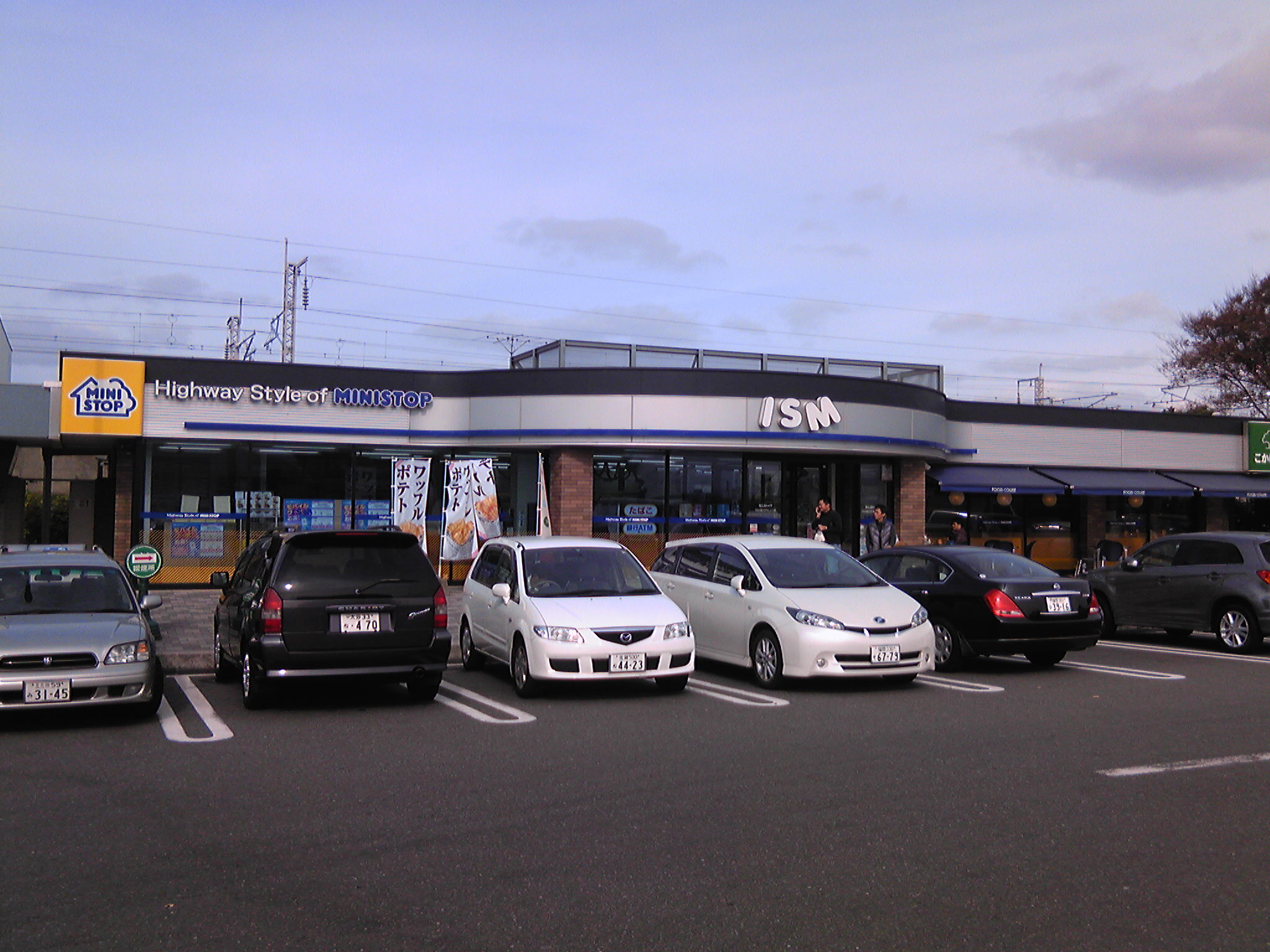 ミニストップ 直方PA下り店（福岡県直方市）